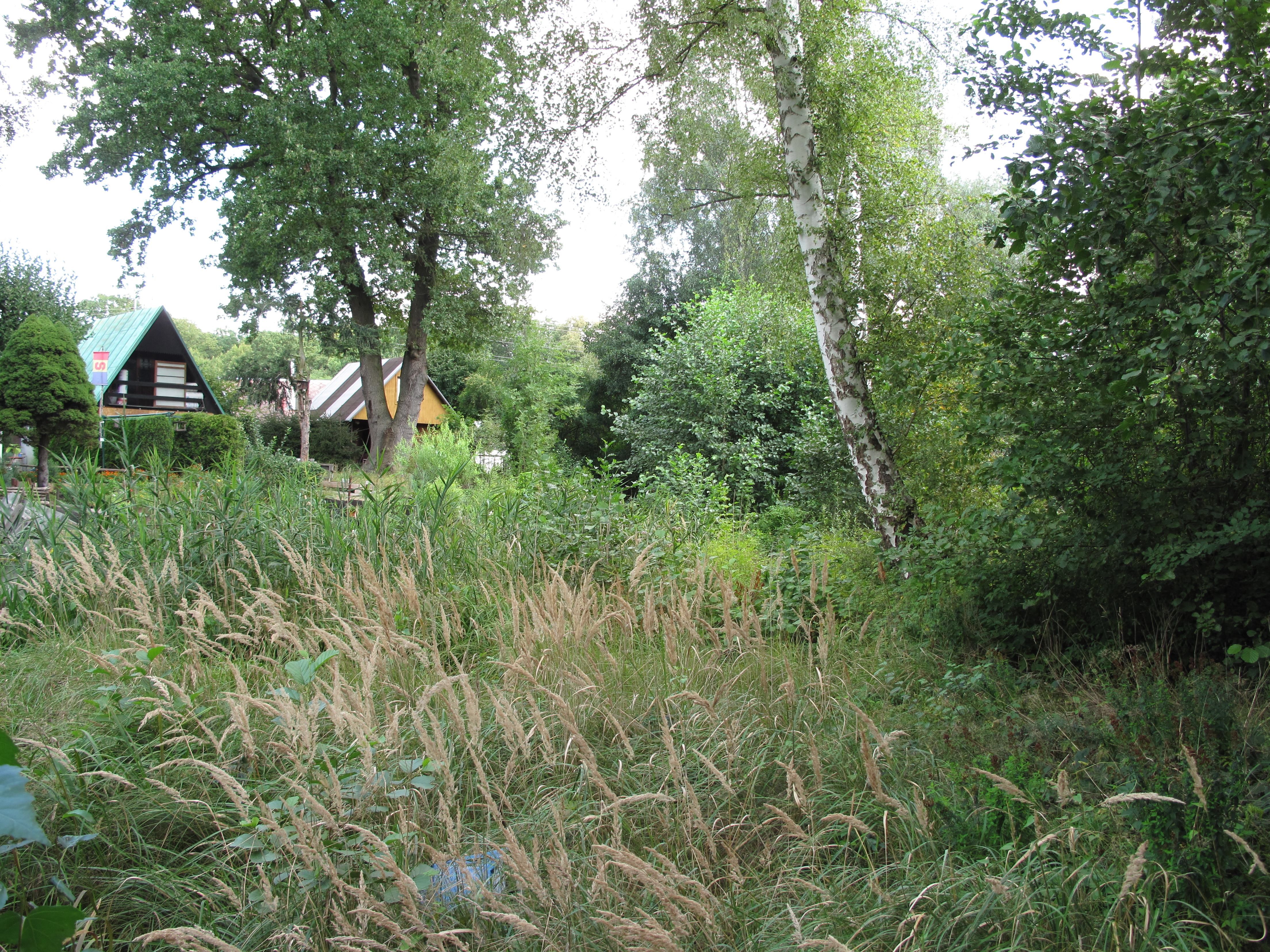 Vodní plocha U hřiště v Káraném. Okres Praha-východ, Česká republika.